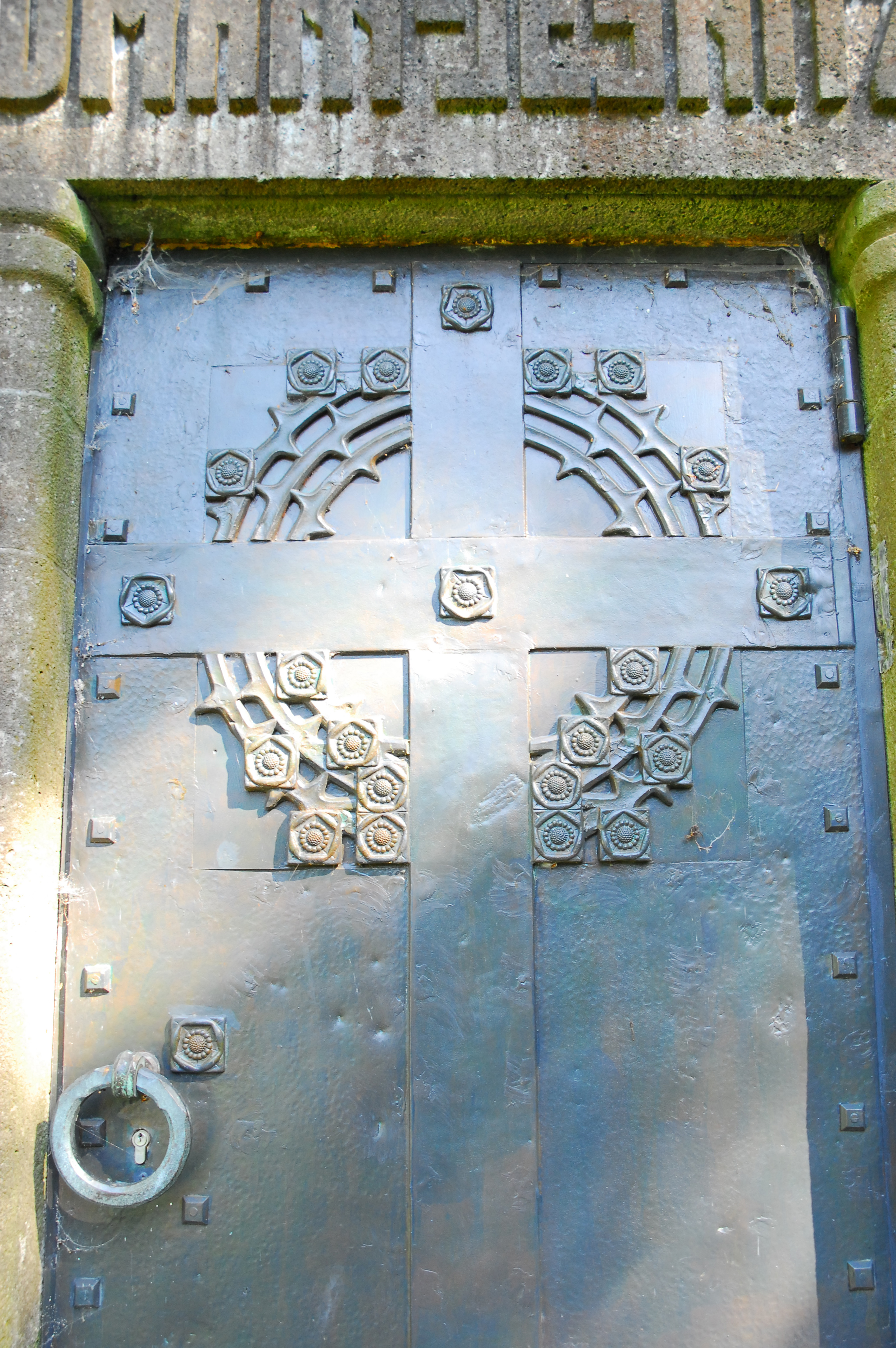 Kolumbarium Erdmann-Jesnitzer auf dem Riensberger Friedhof Bremen